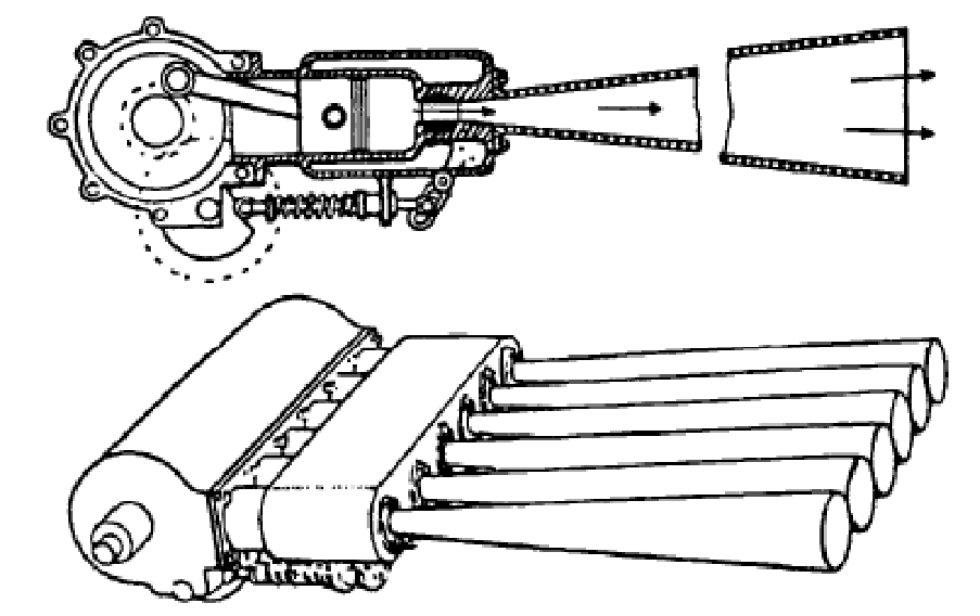 Patententwurf von René Lorin (1908) zu einem Impulsantrieb für die Luftfahrt